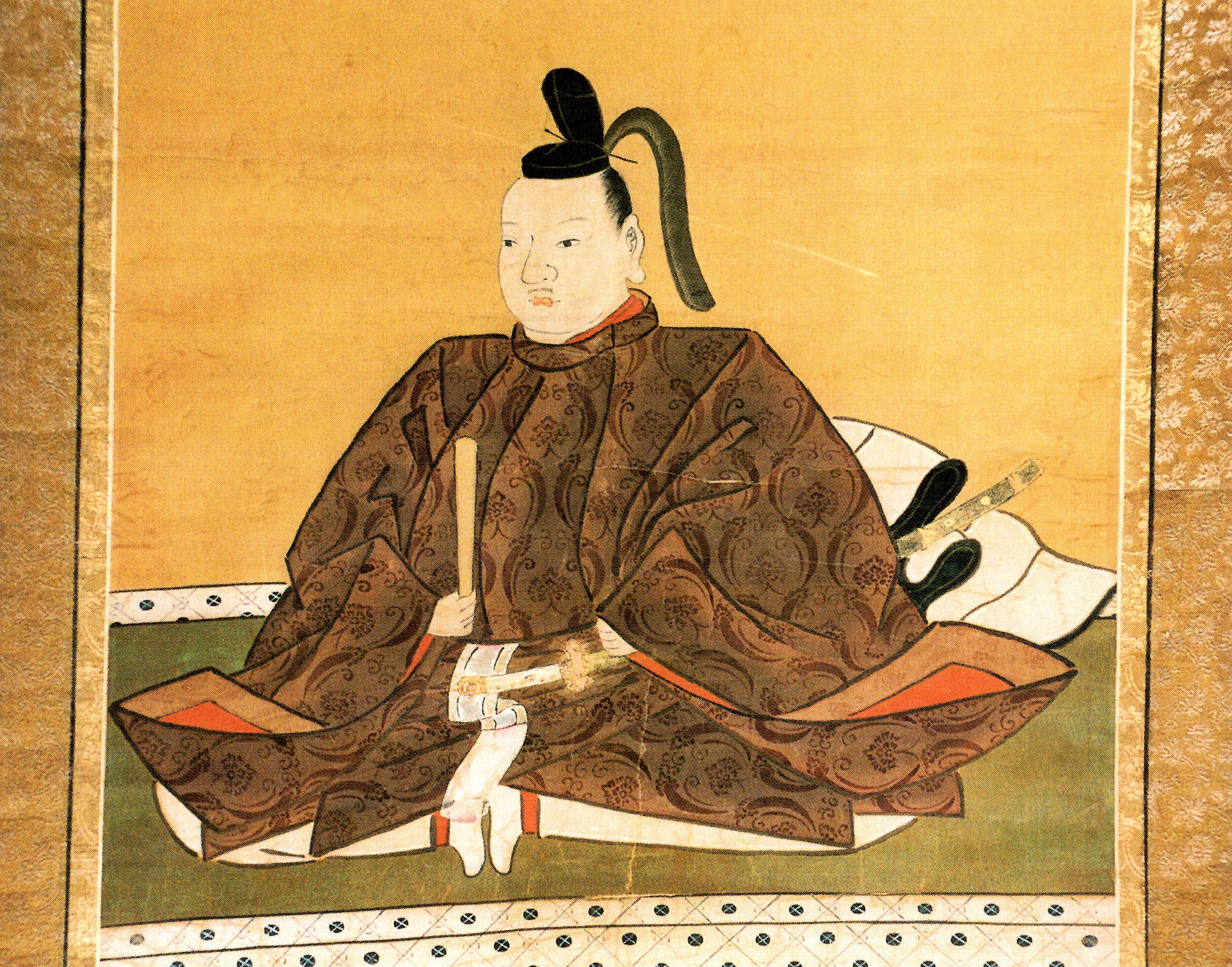 加藤貞泰の肖像。